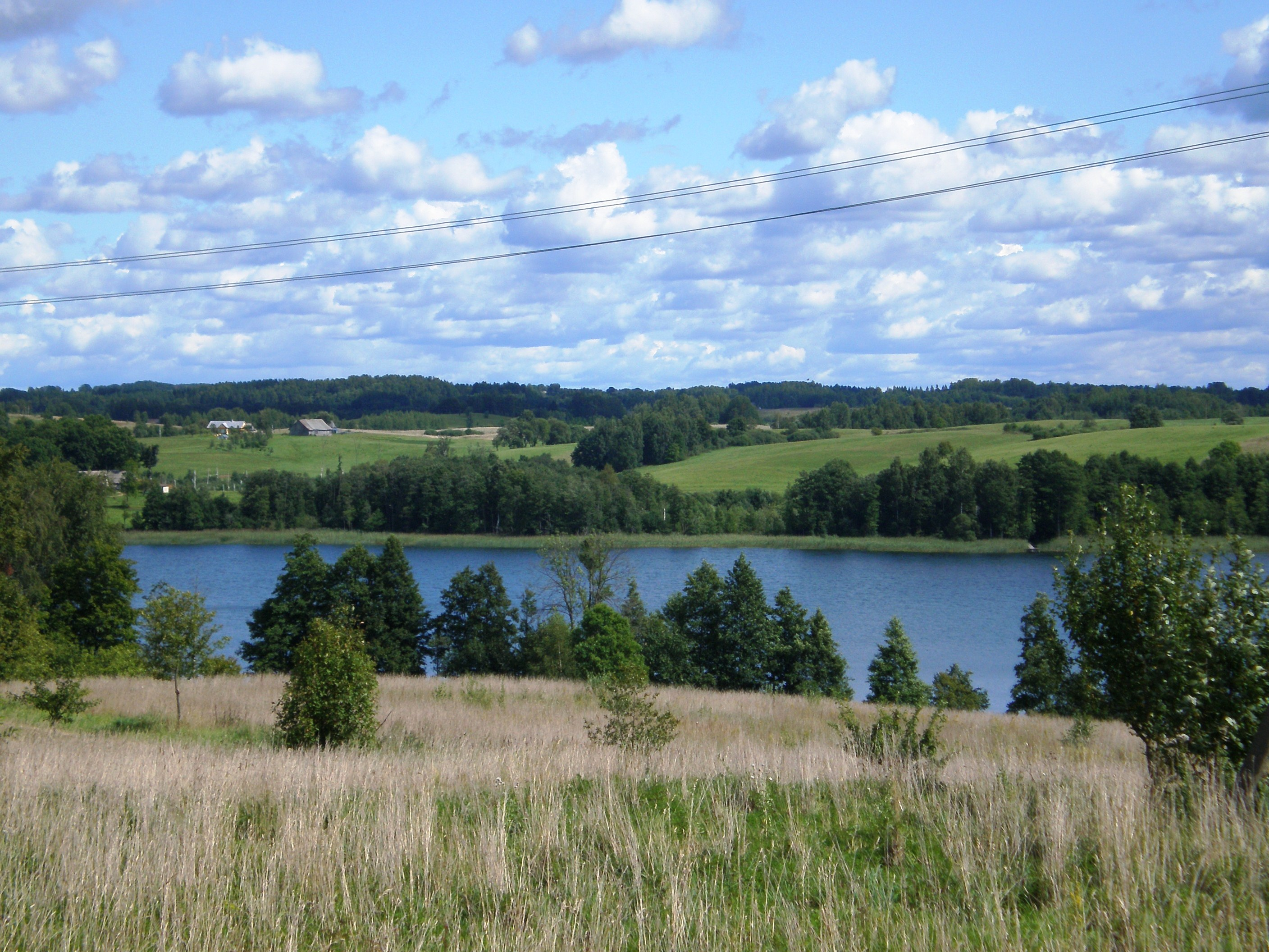 Keležeris, Rokiškio raj., Lietuva